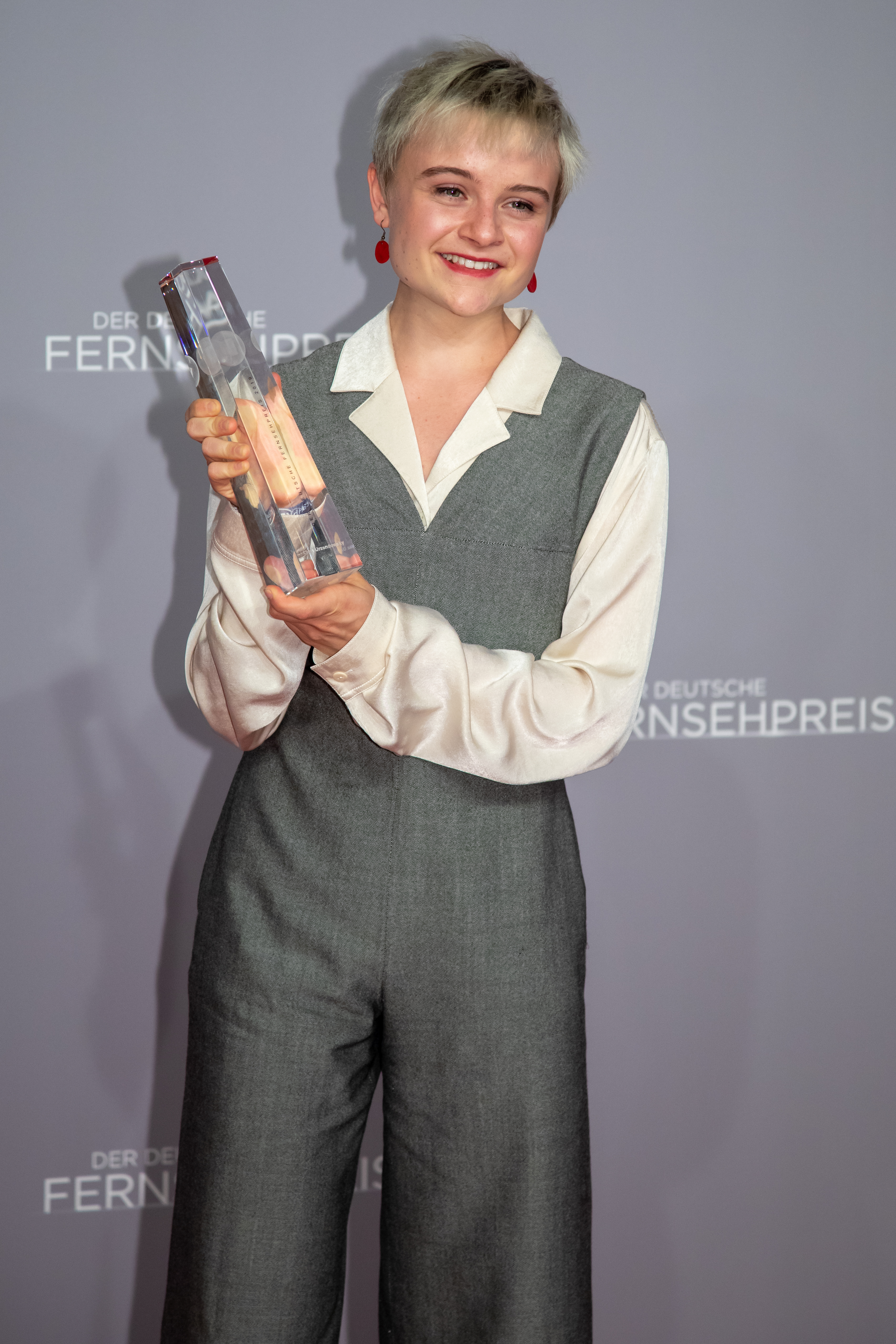 Lena Urzendowsky beim Deutschen Fernsehpreis 2019 in der Düsseldorfer Rheinterrasse